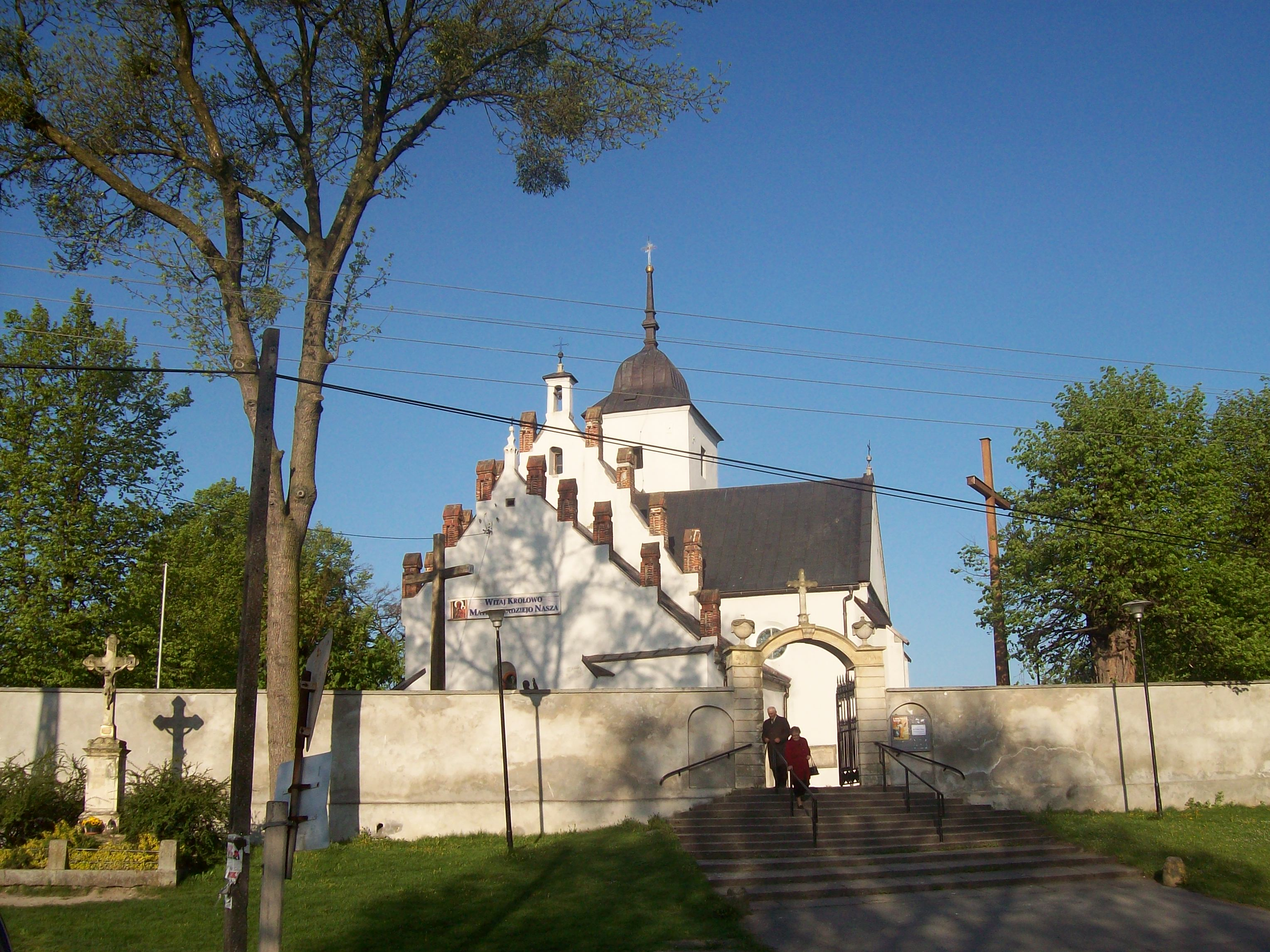 Kościół we Włostowie